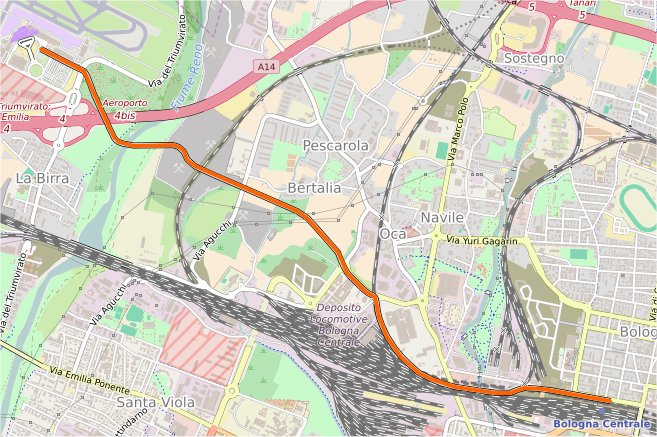 Percorso del people mover di Bologna